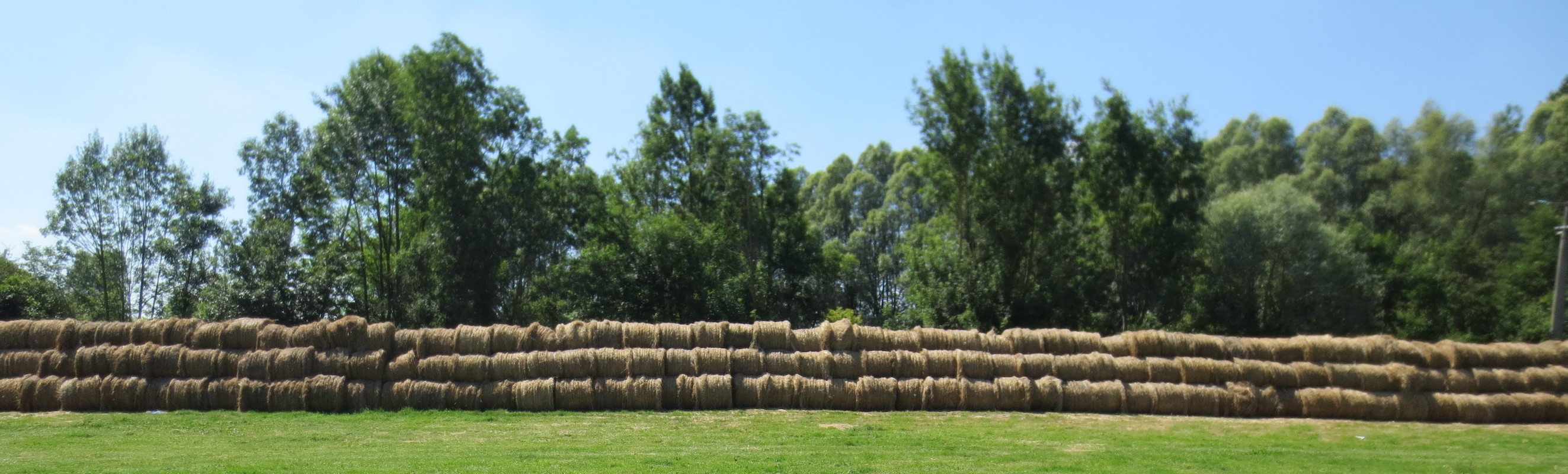 Vue panoramique de Chateau-l'Abbaye